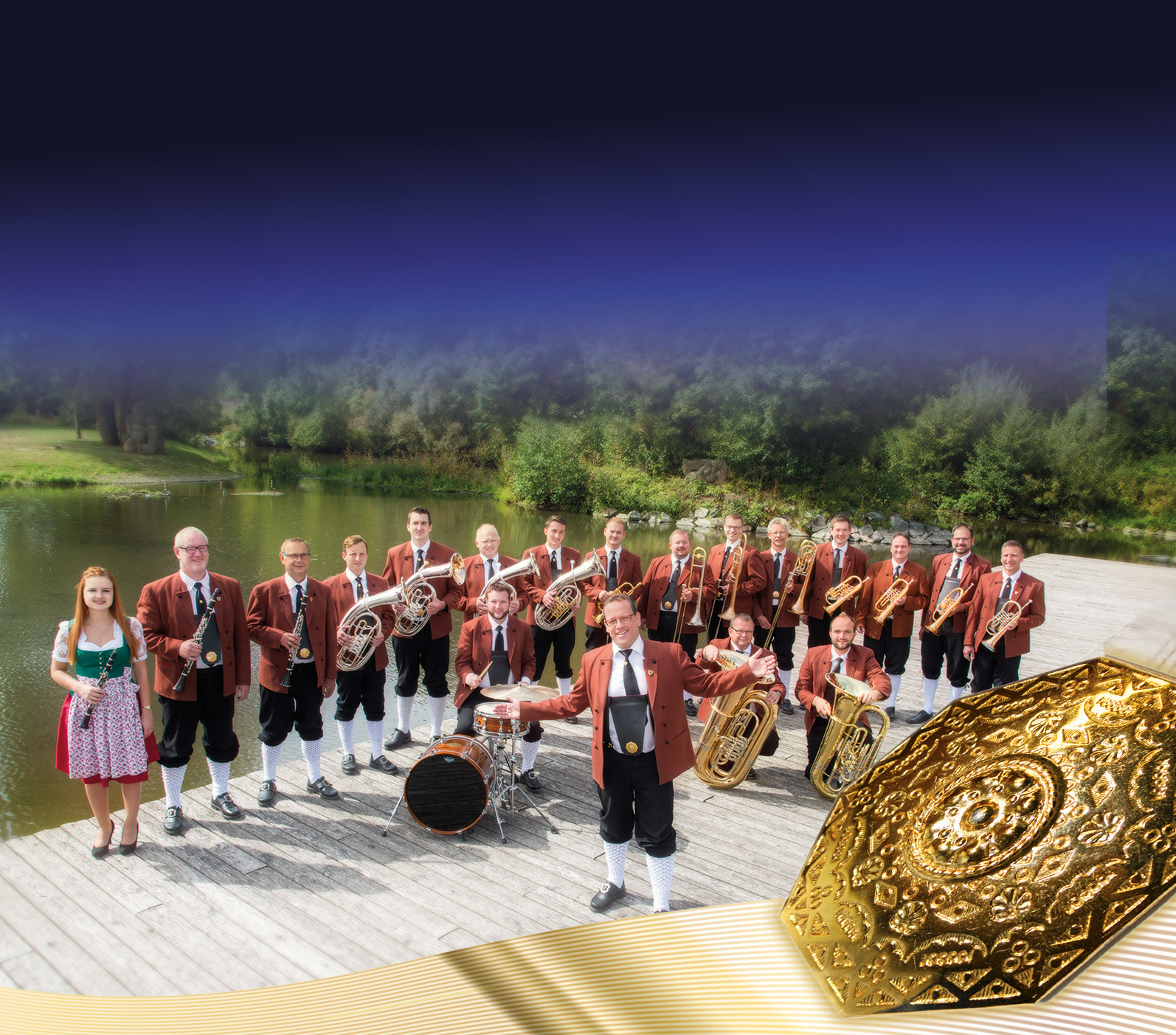 Orchester Holger Mück. Holger Mück und seine Egerländer Musikanten. Gruppenfoto 2020